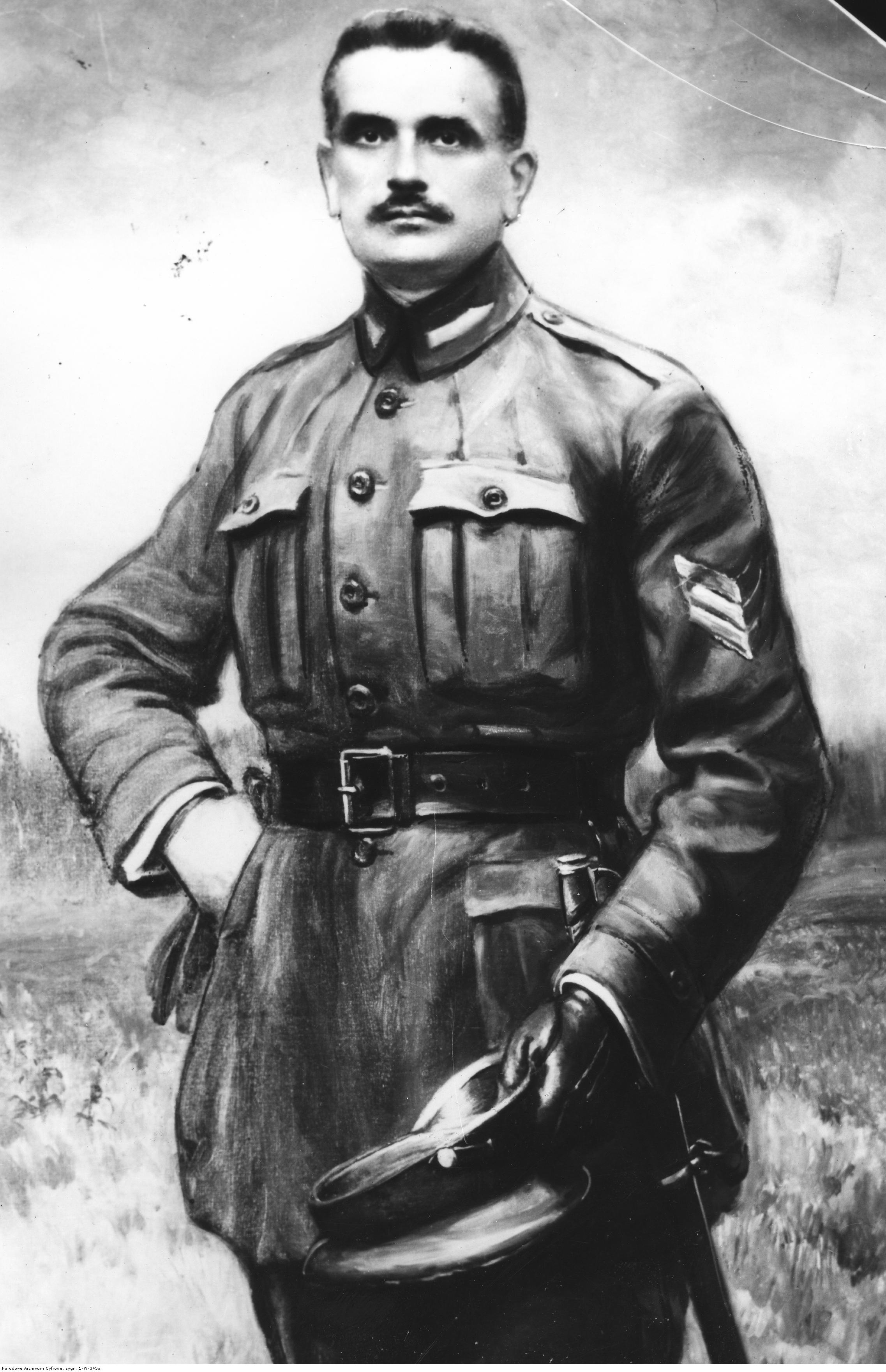 Pułkownik Bolesław Mościcki, dowódca 1 Pułku Ułanów Krechowieckich - fotografia portretu. Koncern Ilustrowany Kurier Codzienny - Archiwum Ilustracji. Sygnatura: 1-W-345a